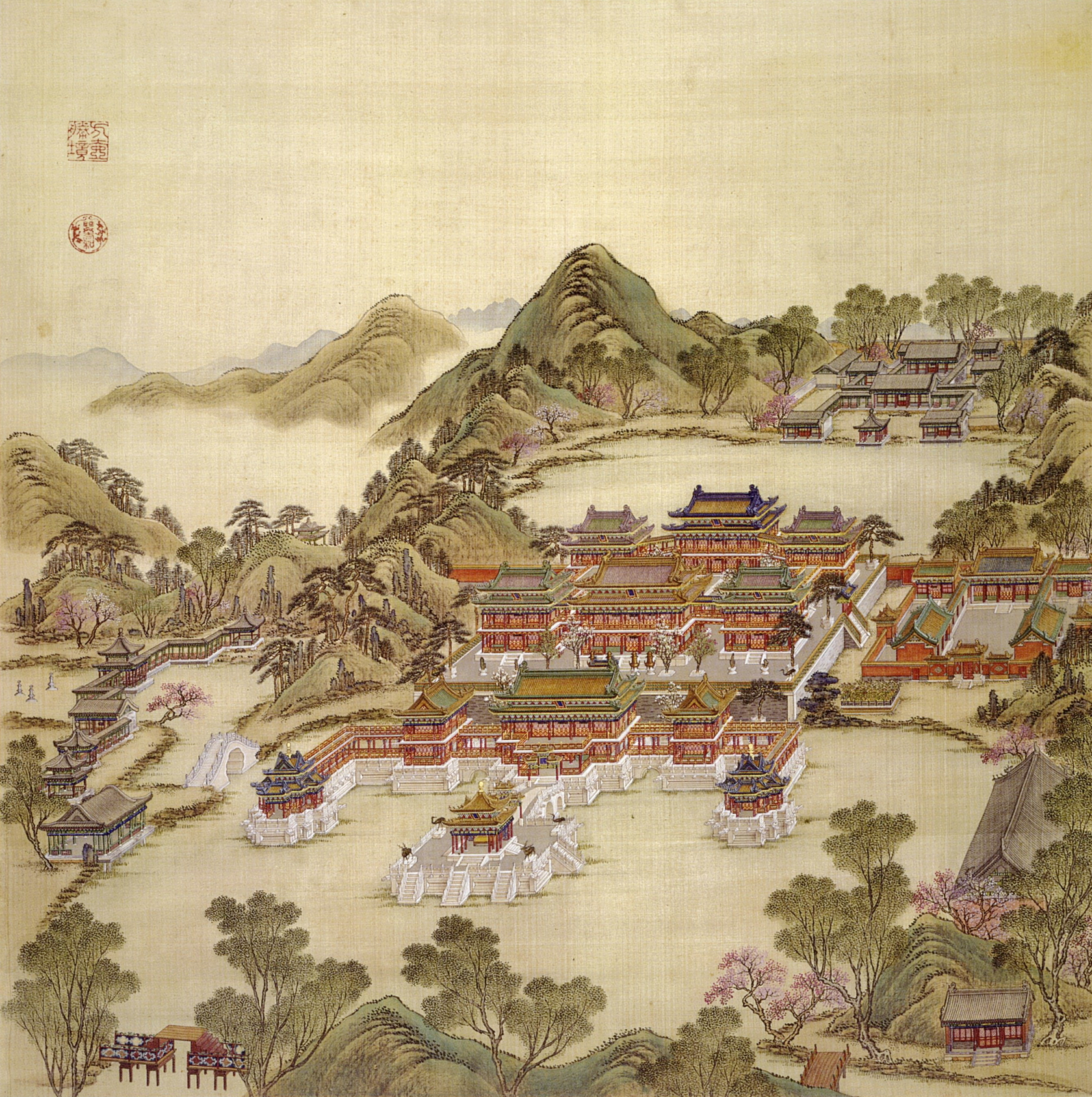 方壺勝景 fāng hú shèng jǐng